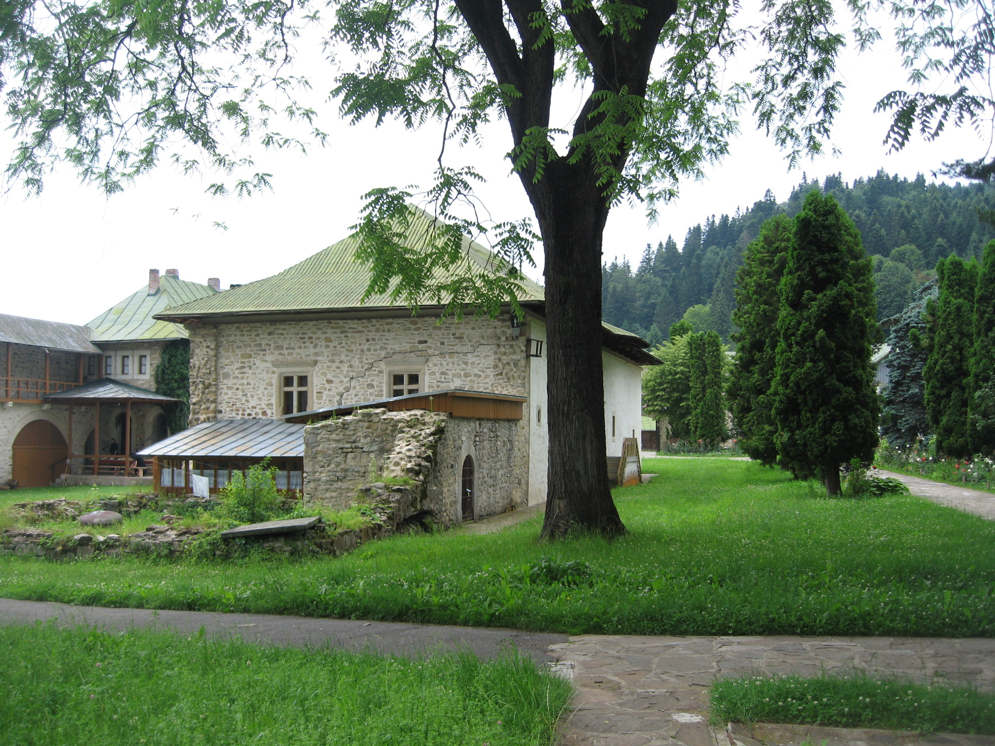 Mănăstirea Slatina